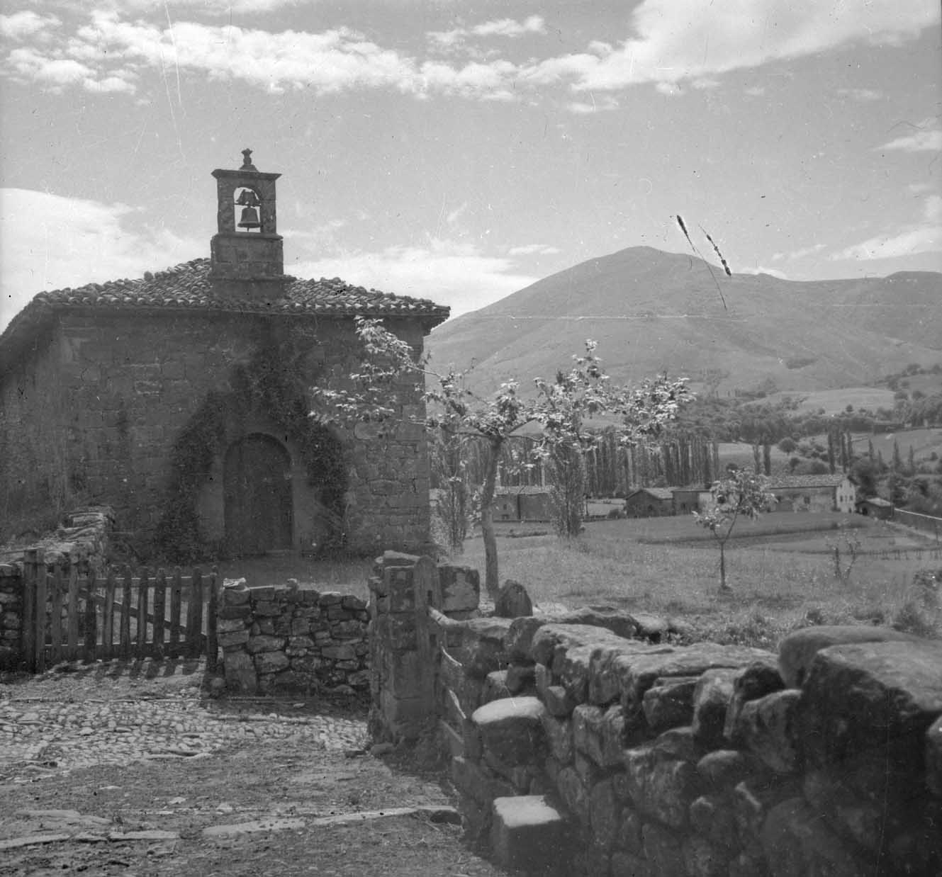 Santa Ana ermita, Urtsua jauregiaren ondoan. Arizkun, Baztan. Gibelean Auza mendia.